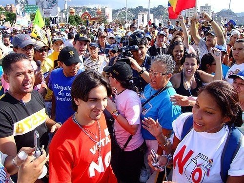 El líder estudiantil de la UCAB, Freddy Guevara, en un acto de la campaña por el No a la Reforma Constitucional de 2007.